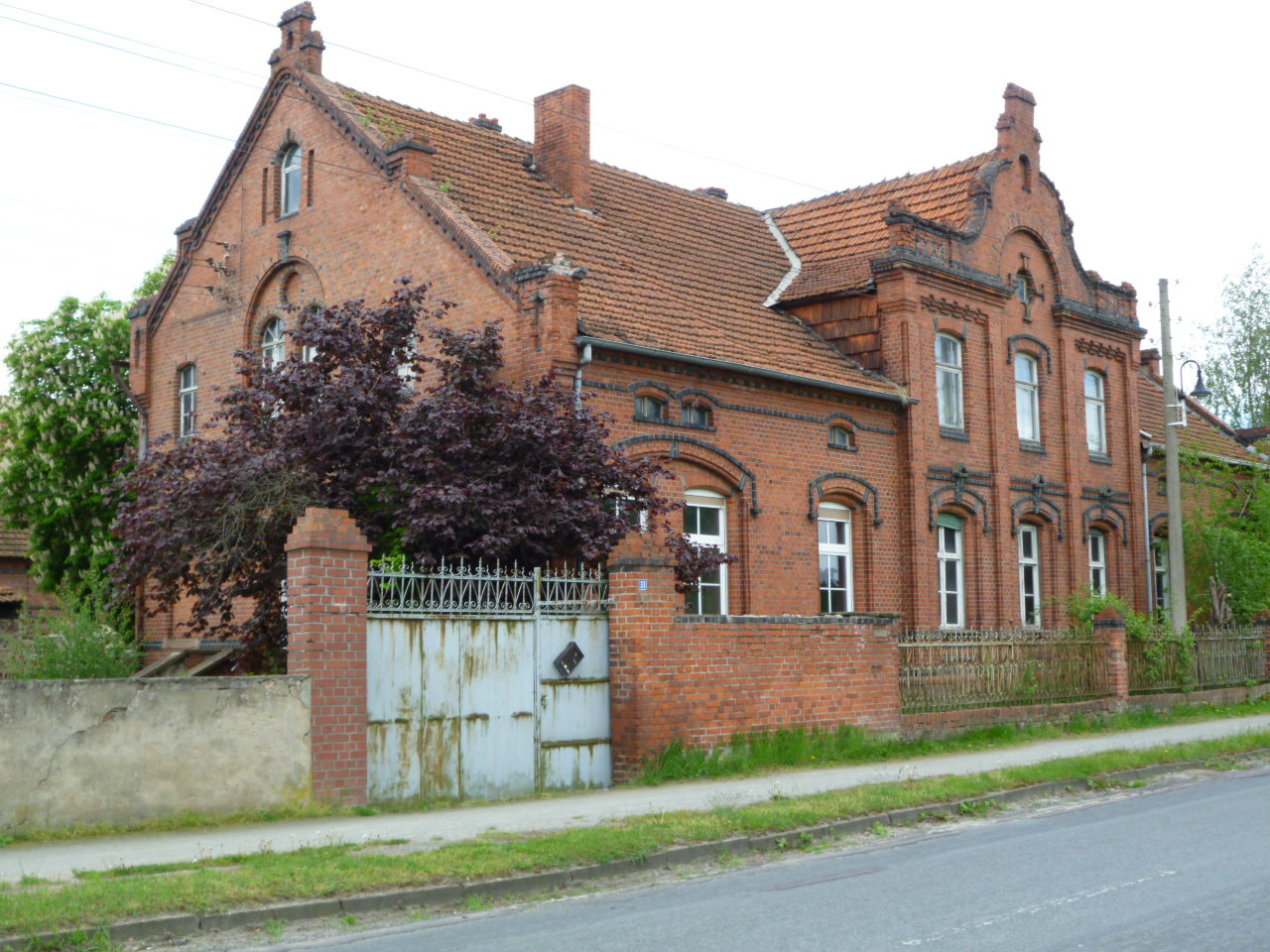 Calvörde-Wegenstedt, Mai 2012, Fabrikantenvilla nähe der Grundschule Am Wald